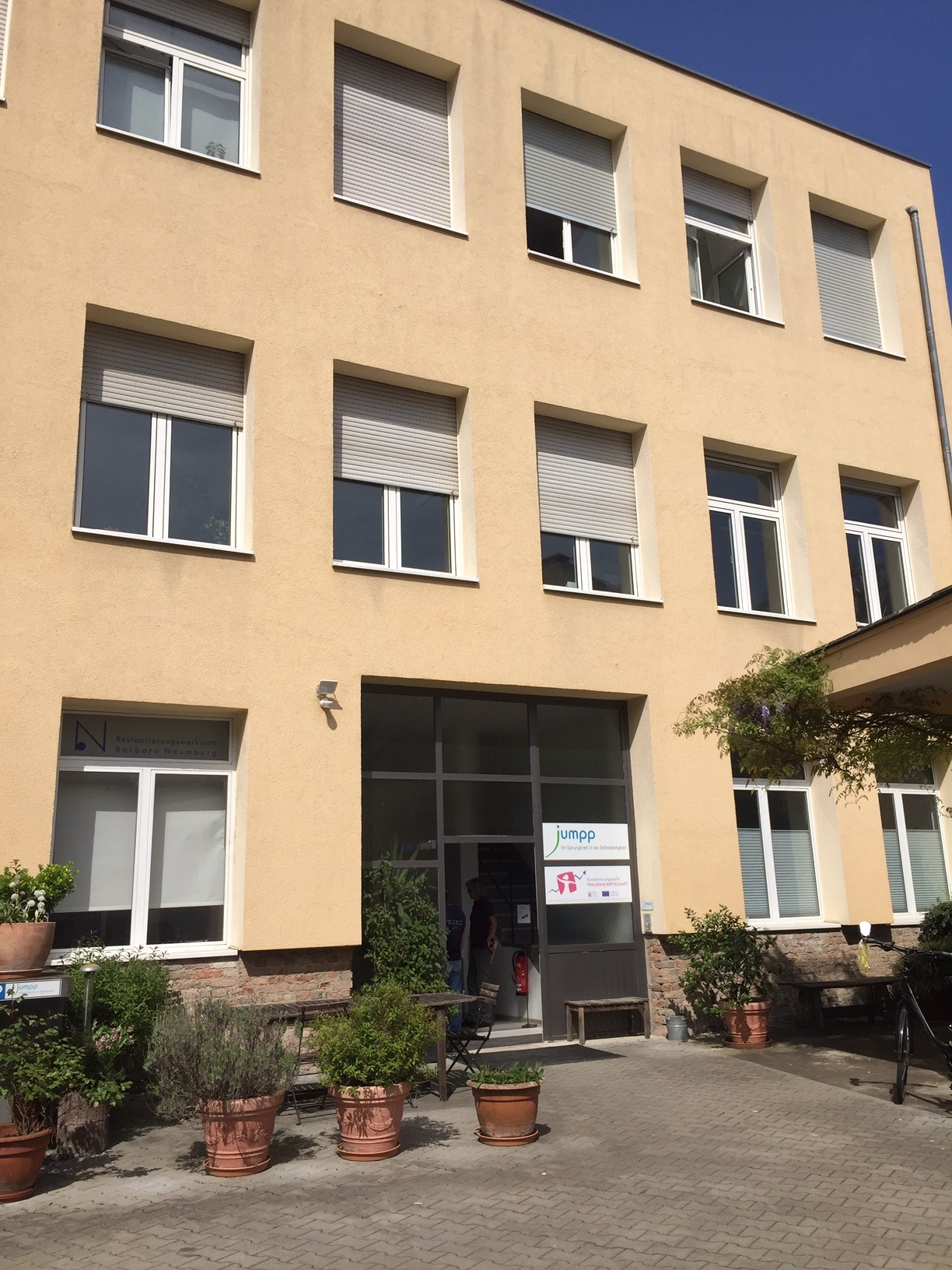 Bürogebäude Jumpp e.V. , Frauenbetriebe, Frankfurt am Main